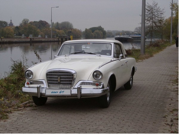 Von mir fotografiert und zur freien Nutzung zur Verfügung gestellt.